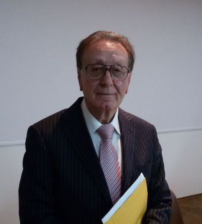 foto